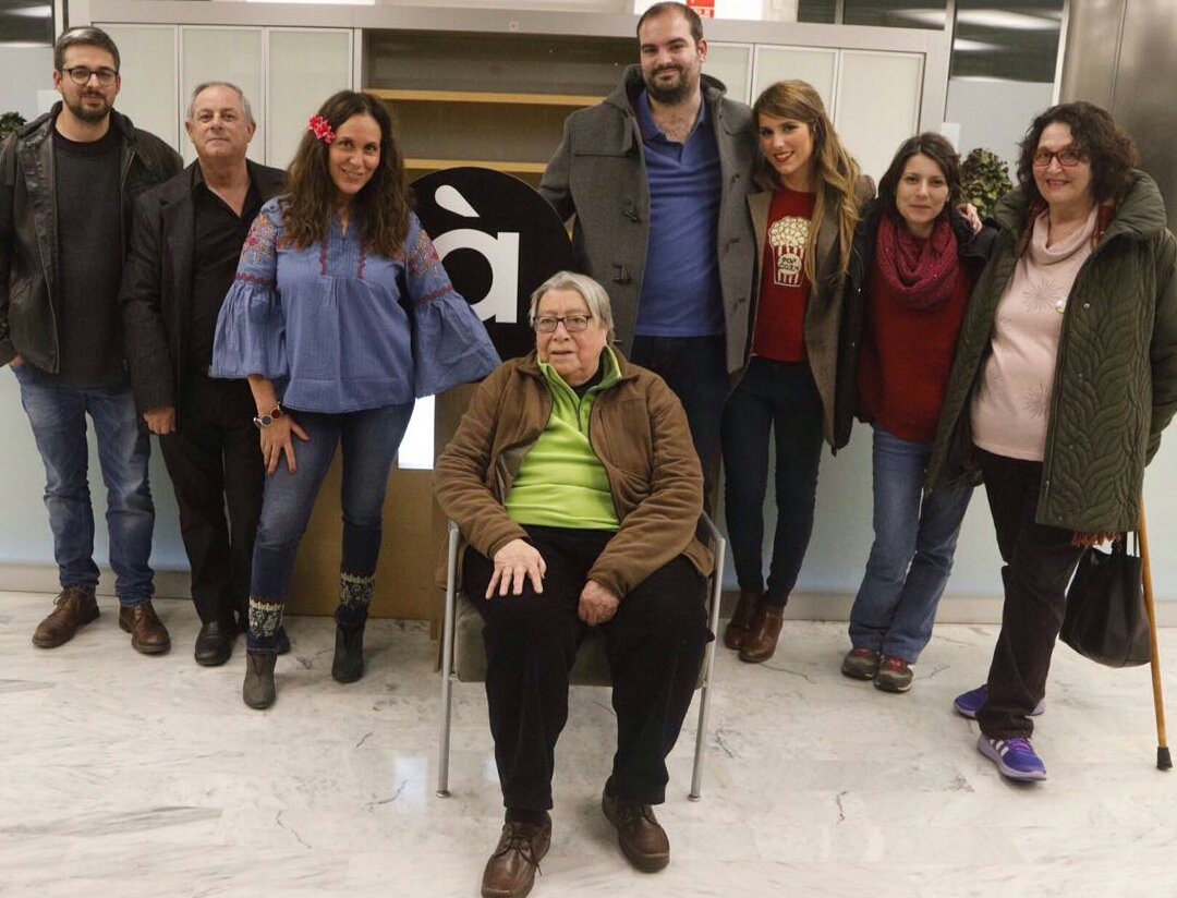 Participants al progrma 'Territori Sonor' el 5 de gener de 2018, coincidint amb el 79 aniversari de Paco Muñoz.